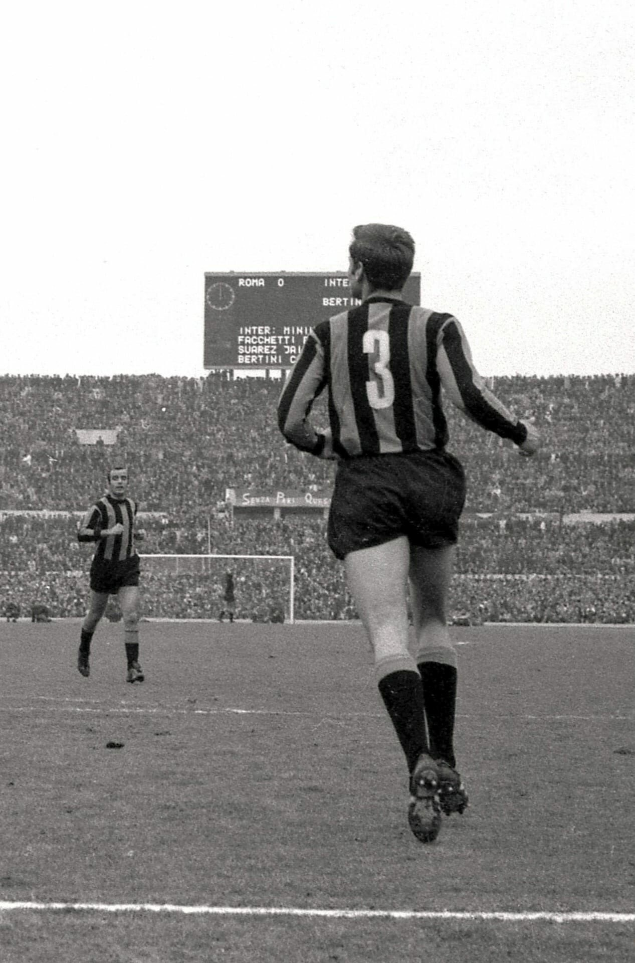 Roma, stadio Olimpico, 9 marzo 1969. Il terzino interista Giacinto Facchetti in azione nel corso della sfida tra AS Roma e FC Internazionale Milano (0-3) valevole per la 21ª giornata del campionato italiano di Serie A 1968-69; sullo sfondo, il compagno di squadra e capitano Mario Corso.